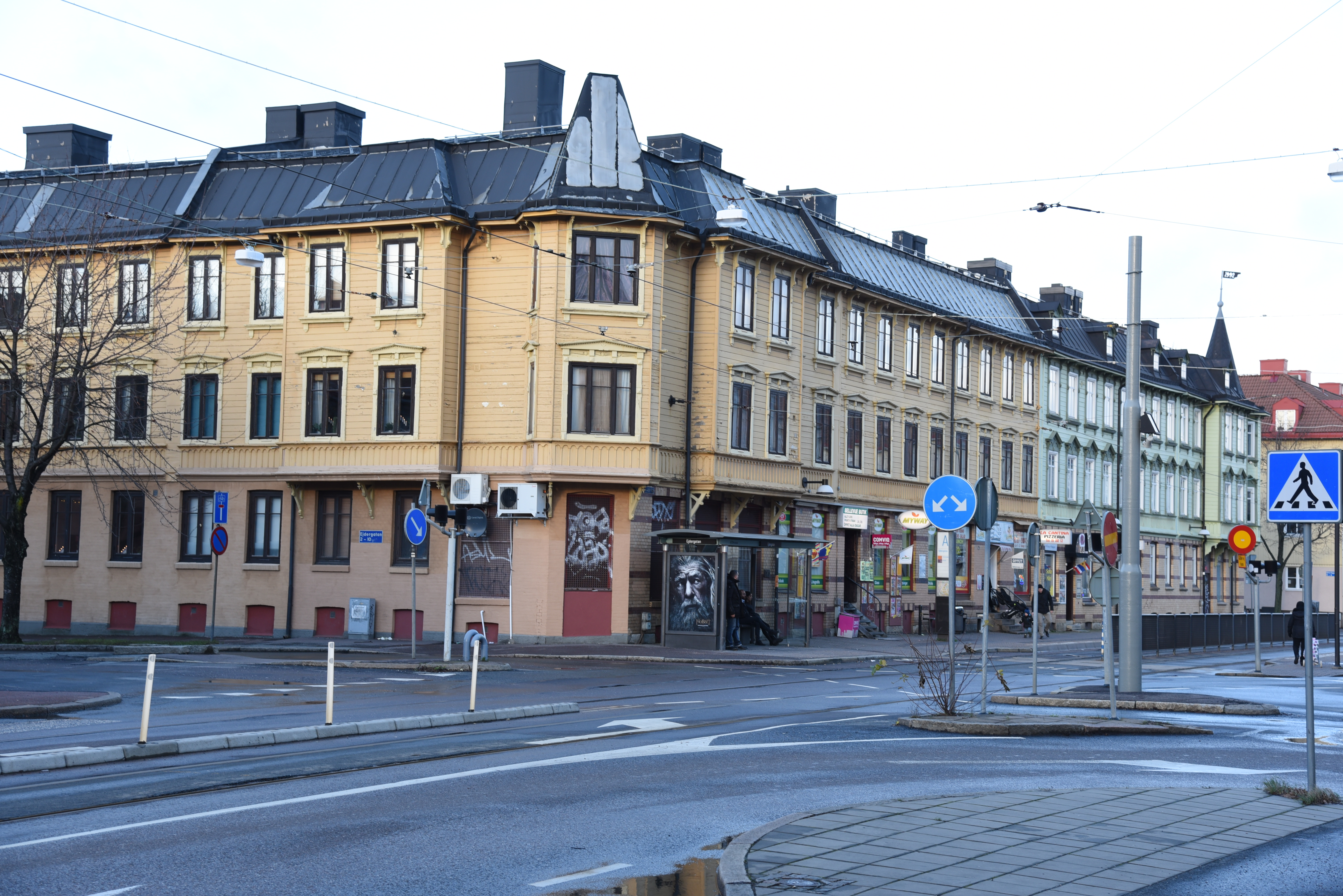 Landshövdingehus vid hörnet av Ejdergatan 2-10 och Ånäsvägen 48-56 i stadsdelen Olskroken i Göteborg.